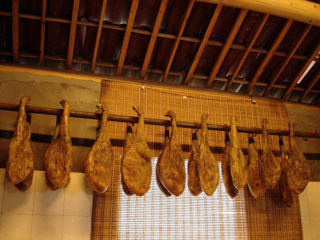 Jinhua ham